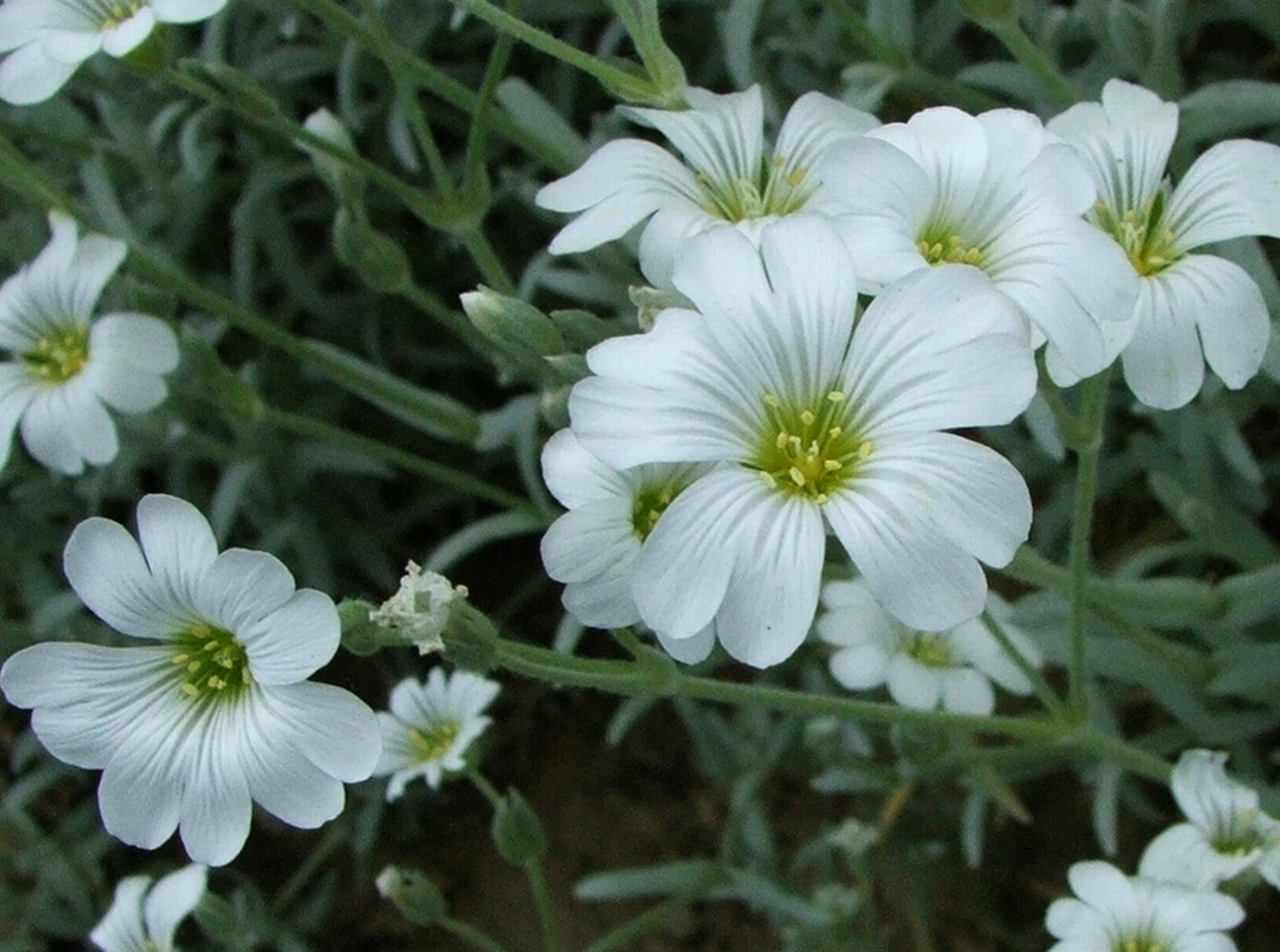 Cerastium tomentosum var columnae (pl. rogownica kutnerowata)